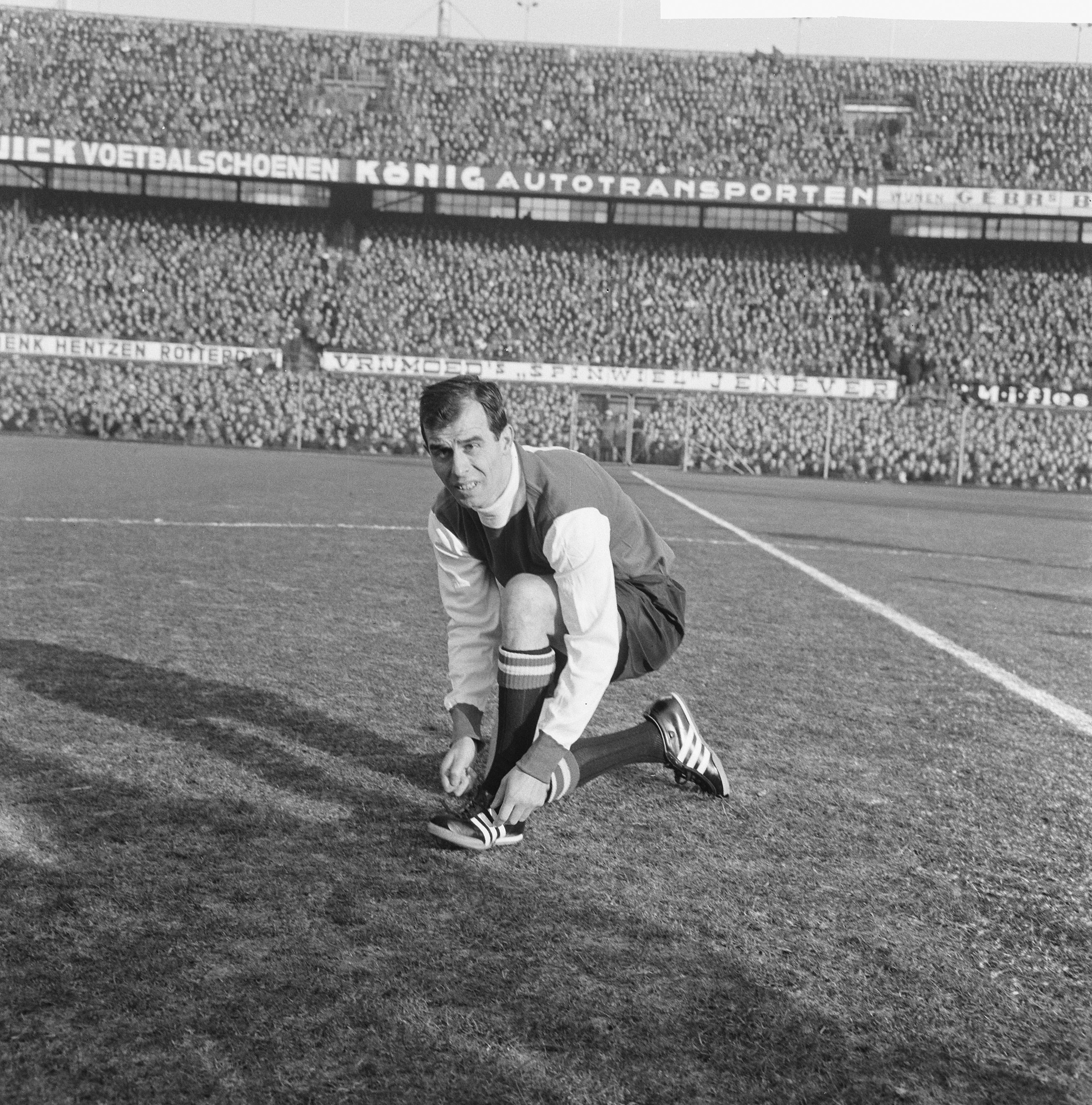 Collectie / Archief : Fotocollectie Anefo Reportage / Serie : Feyenoord tegen Ajax 1-1 Beschrijving : Coen Moulijn strikt zijn veters Datum : 9 januari 1966 Locatie : Rotterdam, Zuid-Holland Trefwoorden : sport, voetbal Persoonsnaam : Moulijn, Coen Instellingsnaam : Feyenoord Fotograaf : Nijs, Jac. de / Anefo Auteursrechthebbende : Nationaal Archief Materiaalsoort : Negatief (zwart/wit) Nummer archiefinventaris : bekijk toegang 2.24.01.03 Bestanddeelnummer : 918-6570